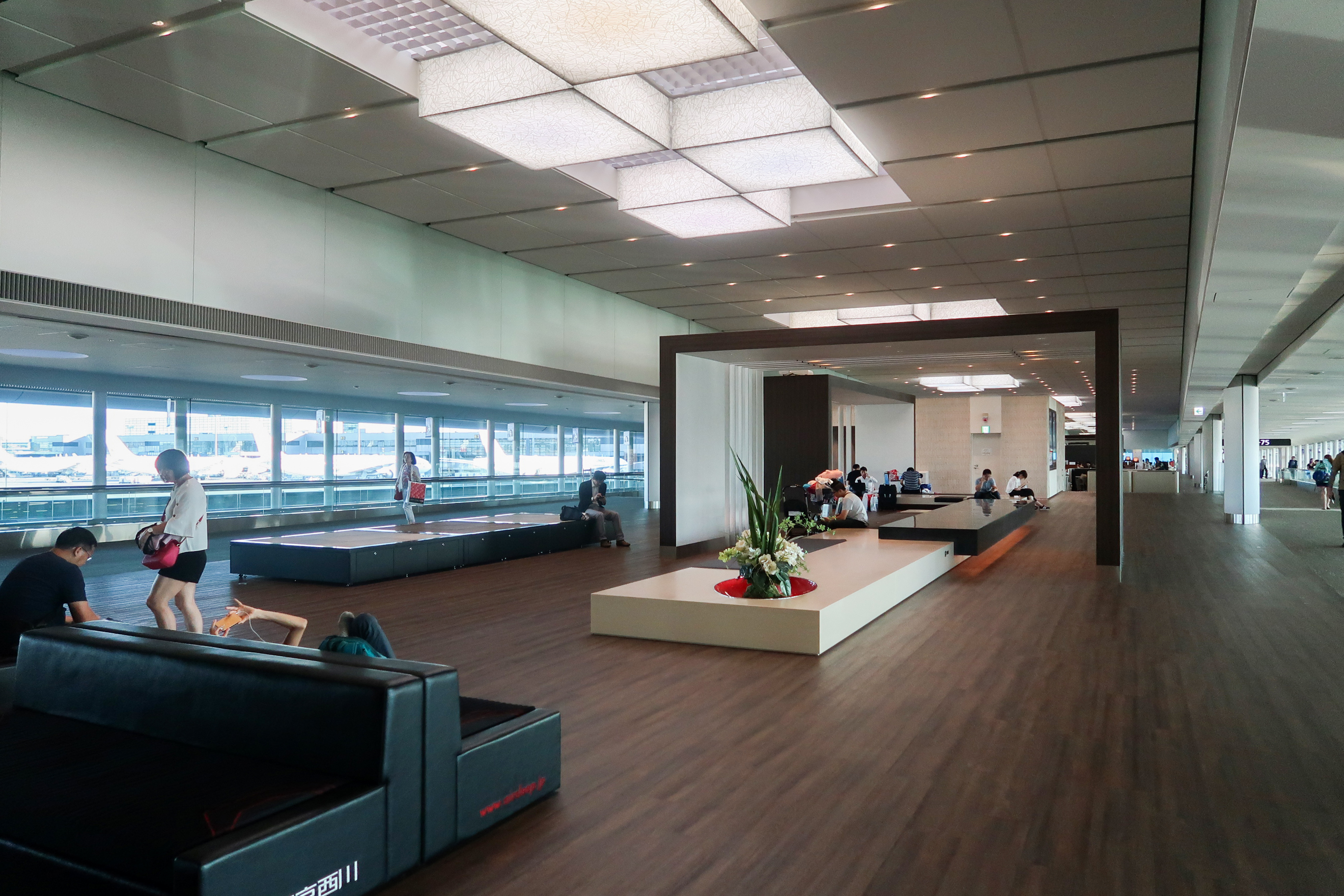 Narita Airport Terminal 2